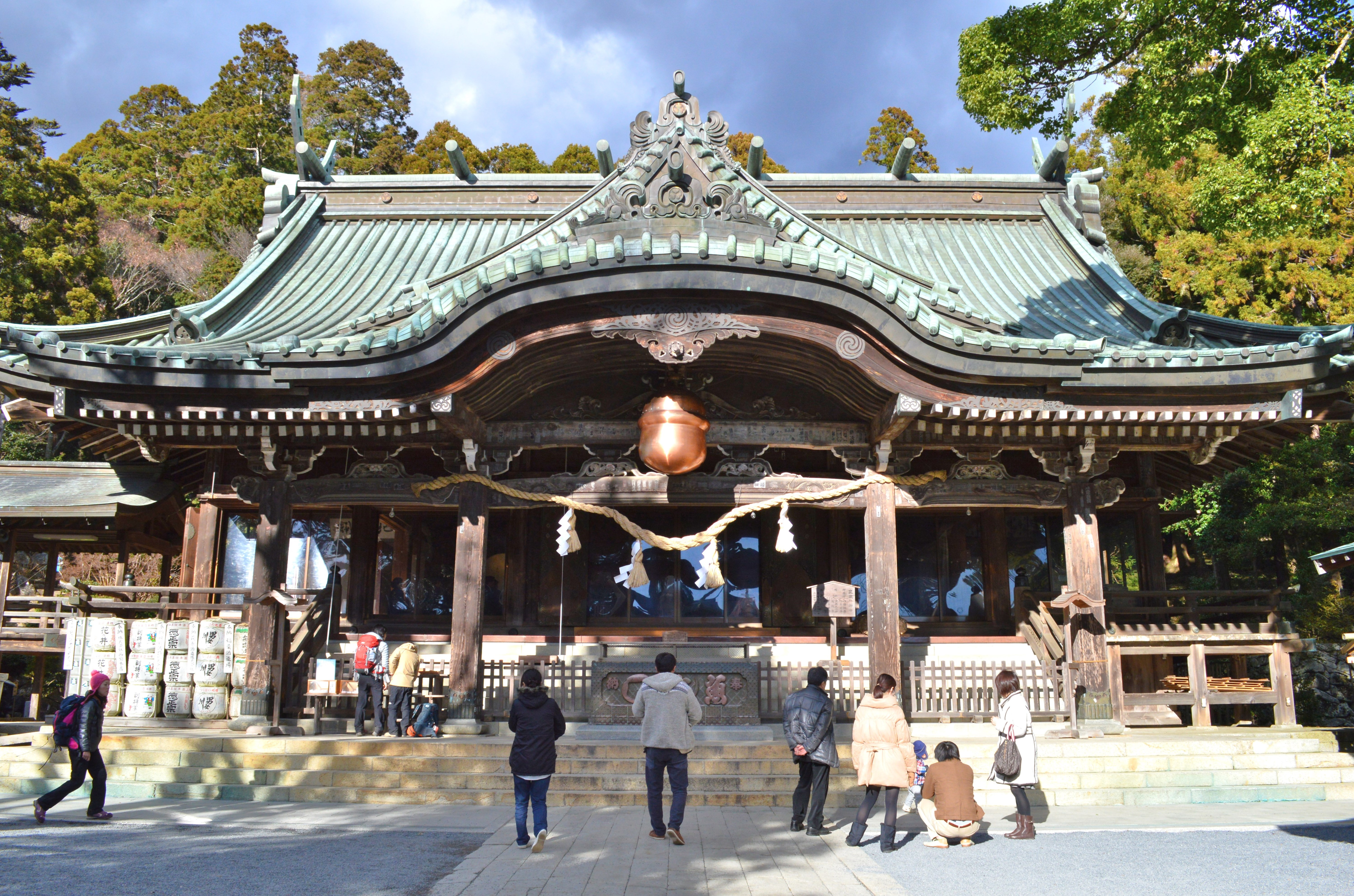 筑波山神社 拝殿